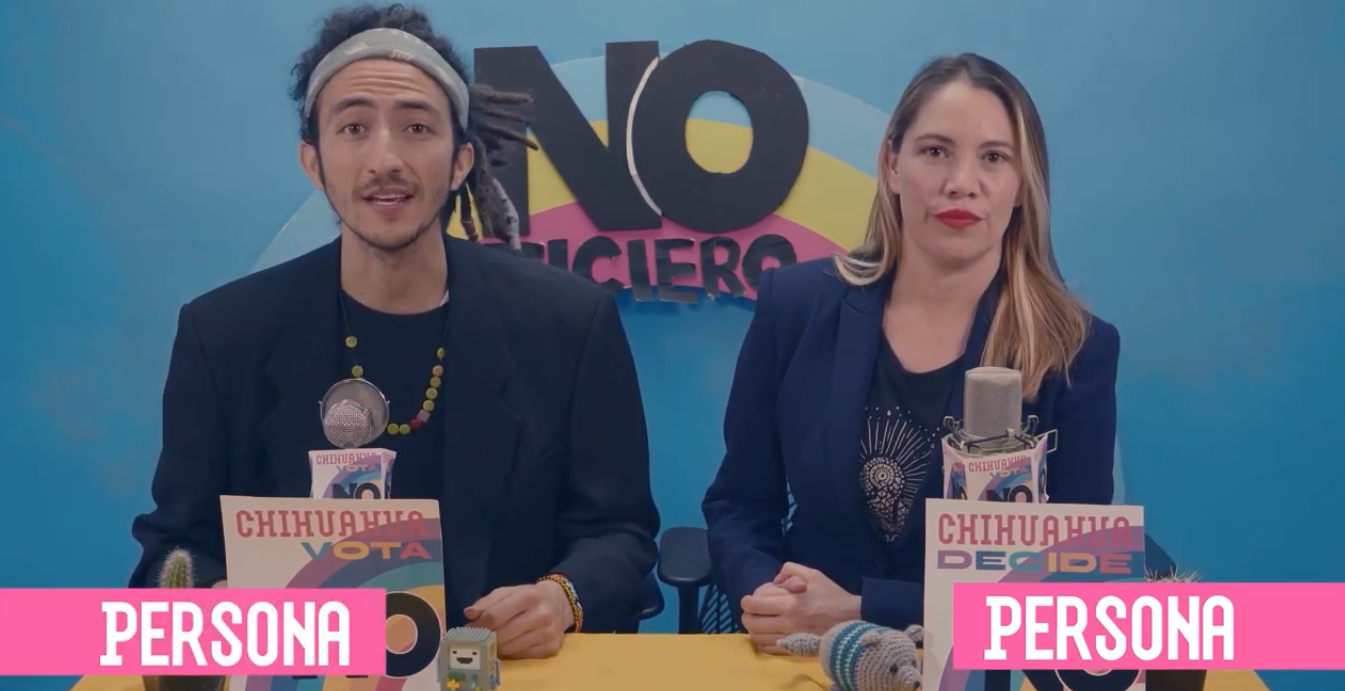 Noticiero realizado por los promoventes del plebiscito realizado en Chihuahua, México el 24 de Noviembre del 2019. En este Noticiero se buscaba promover la opción del "NO"